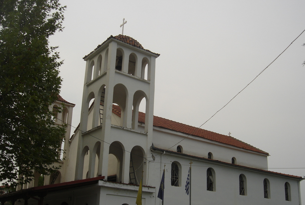 A church at Mesaia Milia or Mesi Milia, Pieria.